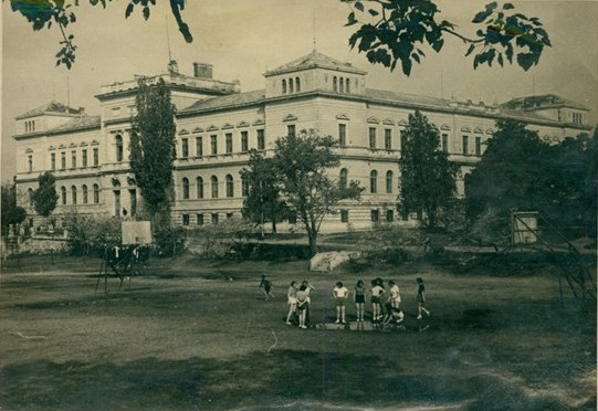 Сградата на Варненската девическа гимназия „Мария-Луиза“. Сега в нея се помещава Варненският археологически музей.